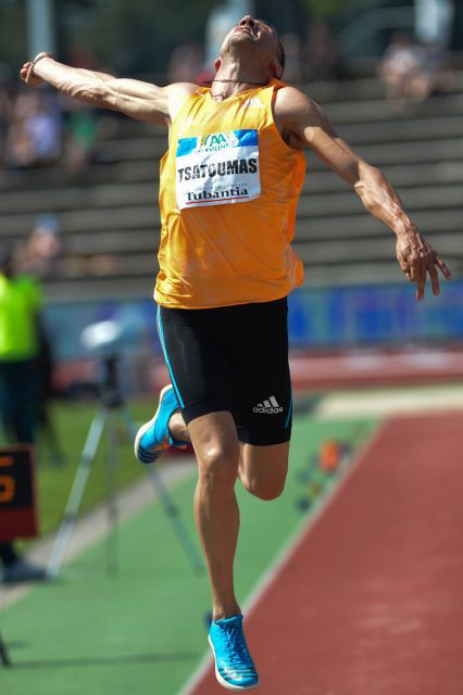 Louis Tságoumas tijdens de FBK Games te Hengelo, Nederland, in 2014